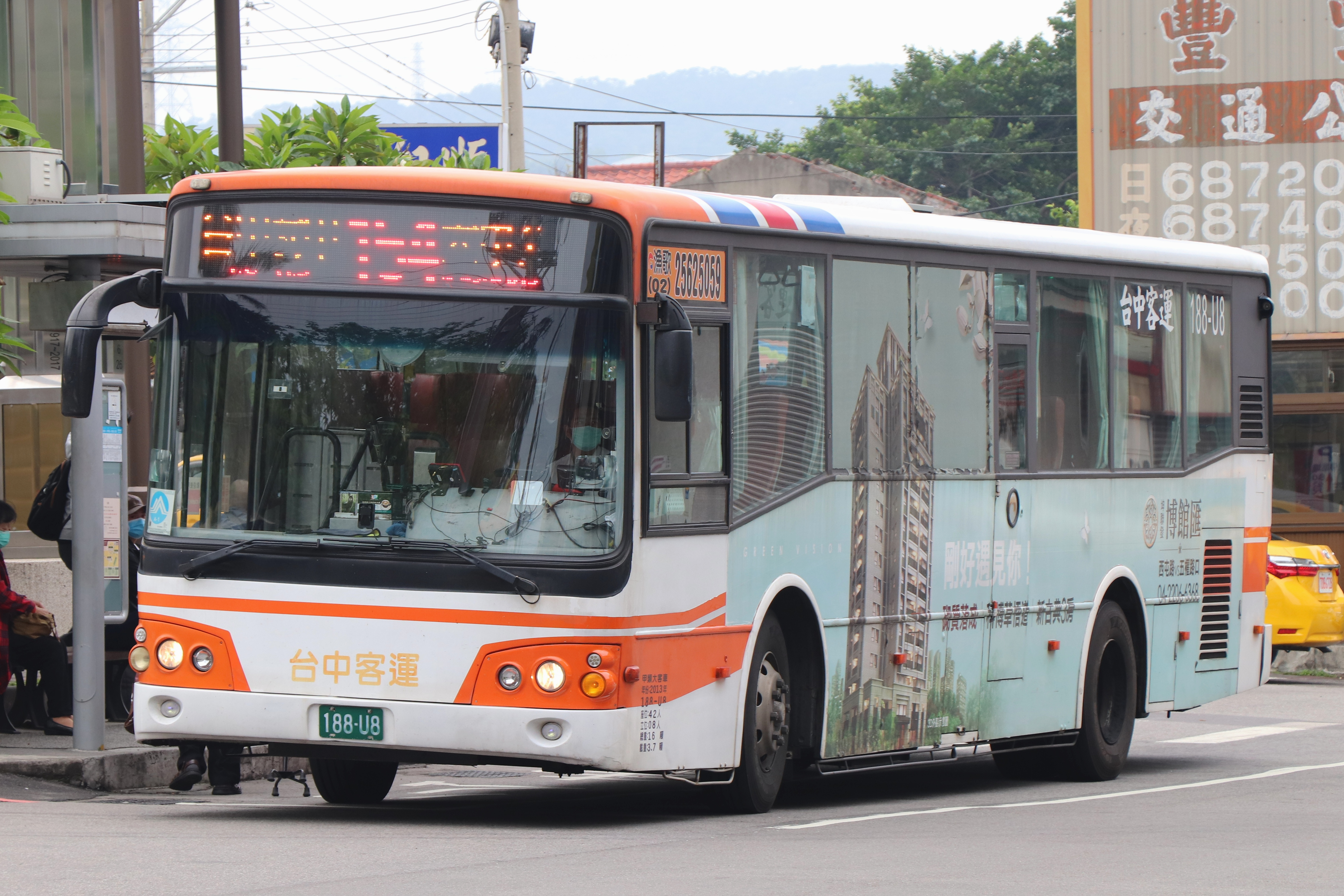 台中客運 大宇BC211MA大客車 188-U8